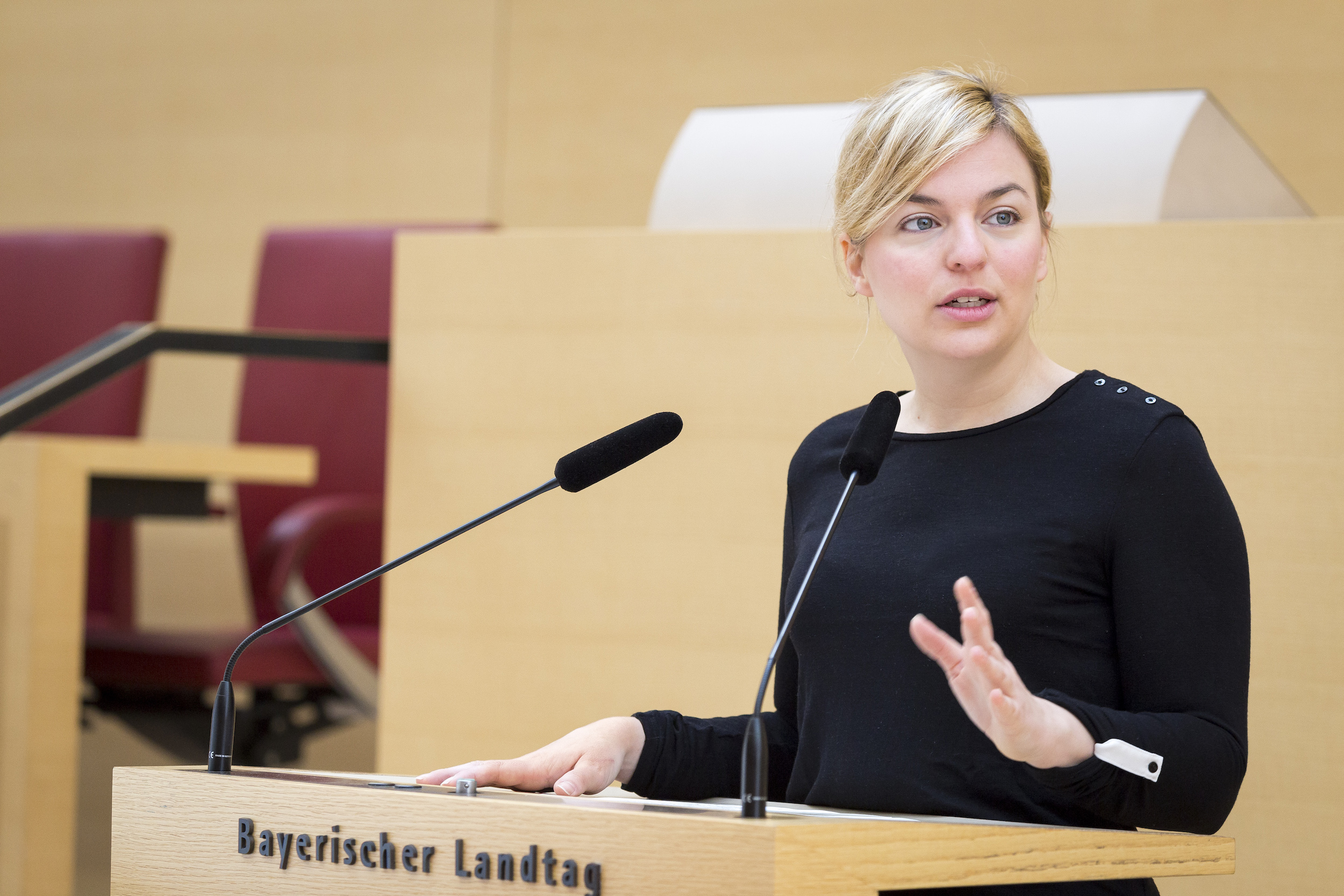 Katharina Schulze am Redepult im Plenum des Bayerischen Landtags. Foto: Andreas Gregor